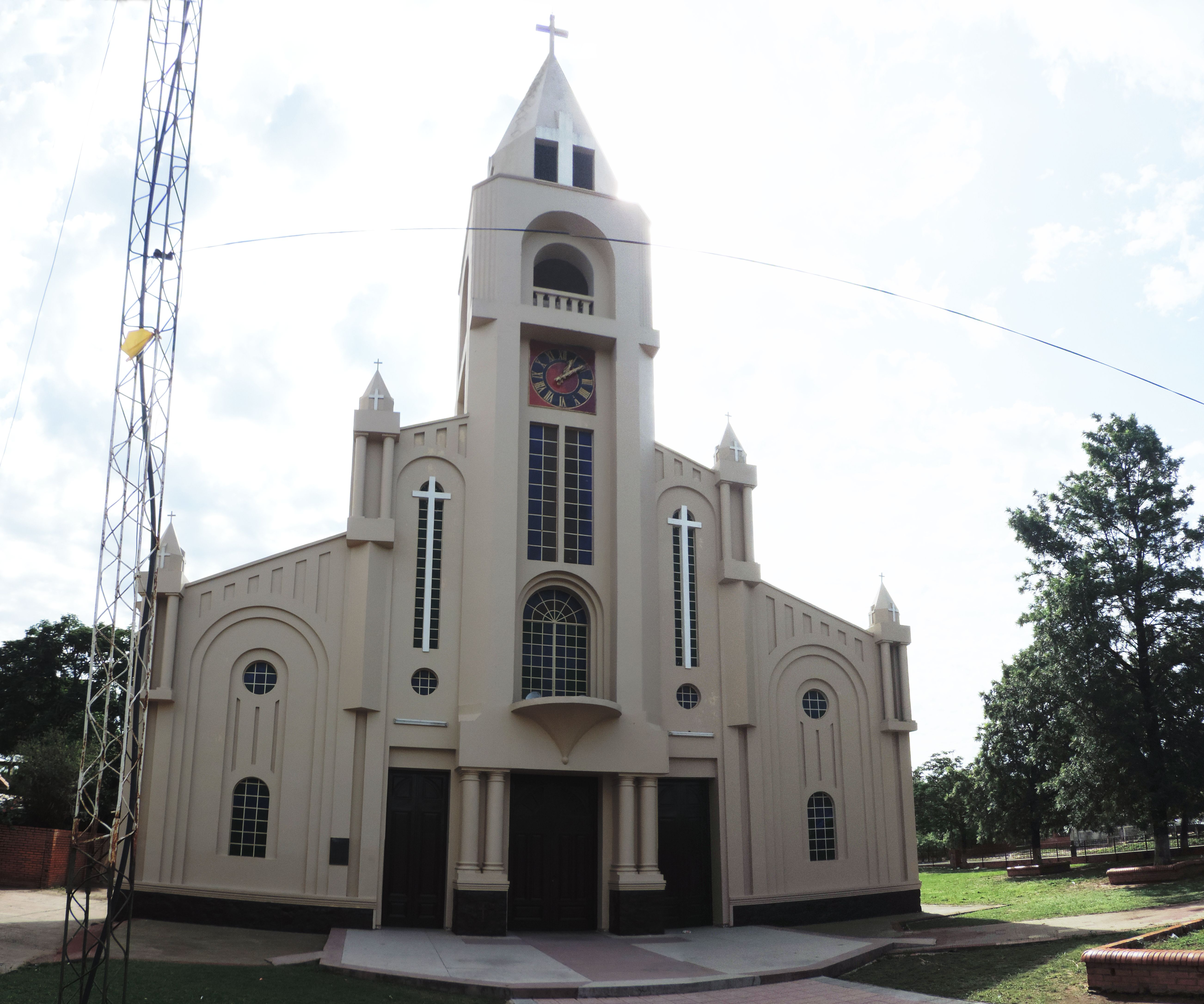 Iglesia de Villa Hayes